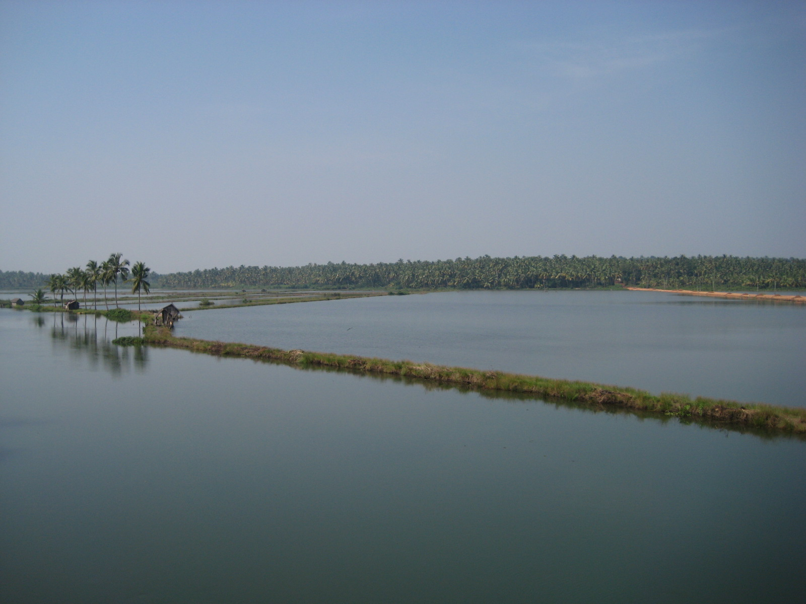 പുത്തൻചിറ നെയ്തക്കുടി തണ്ണീർത്തടം